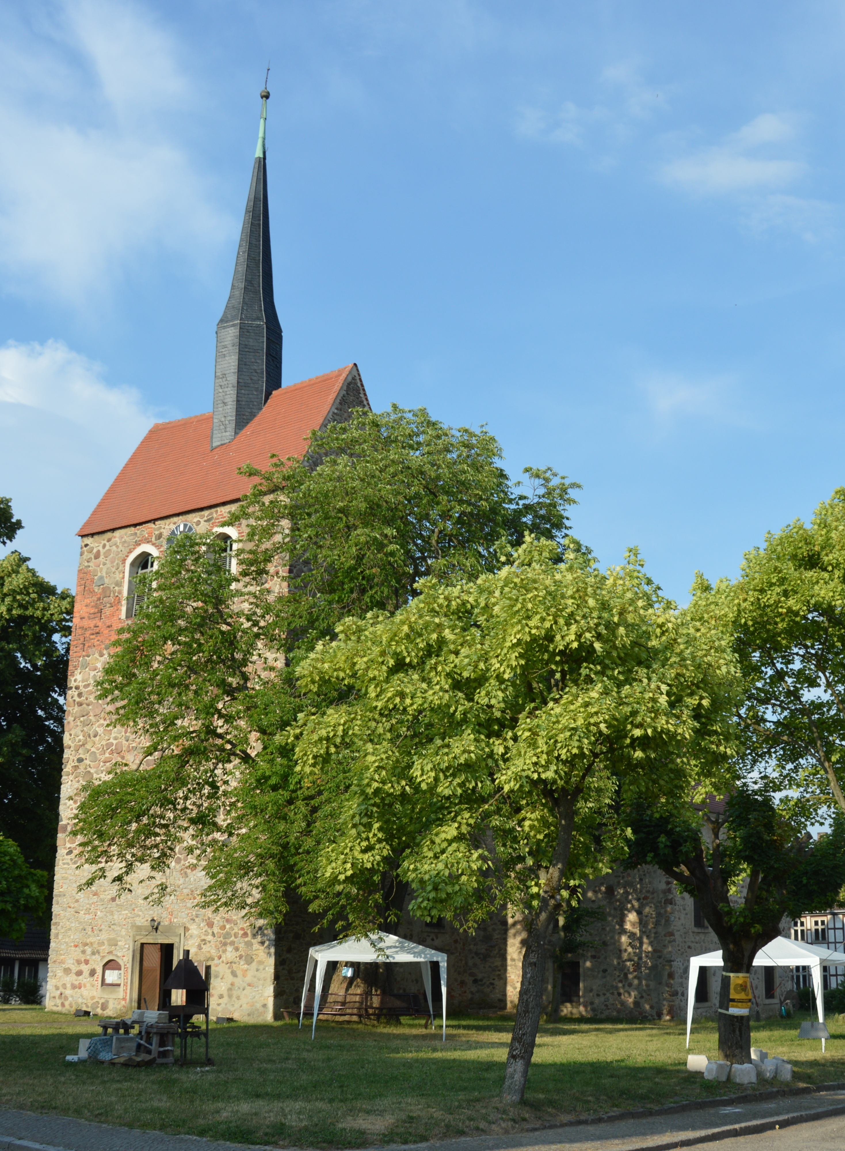 Kirche in Kalbe (Milde)